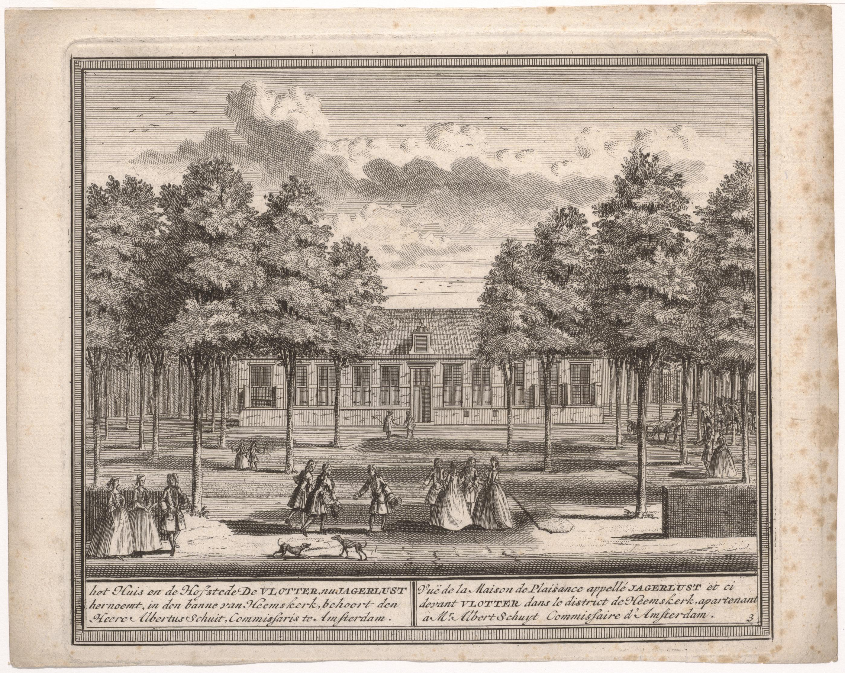 Beschrijving Het Huis en de Hofstede De Vlotter, nu Jagerlust hernoemt, in den banne van Heemskerk, behoort den Heere Albertus Schuit, Commissaris te Amsterdam Aanzicht van het huis en de hofstede Jagerlust (voorheen De Vlotter) in Heemskerk, eigendom van Albertus Schuit, commissaris in Amsterdam. Tevens voorzien van onderschrift in het Frans. Ets uit: 'Het zegepralent Kennemerland', door H. de Leth en M. Brouerius van Nidek, Amsterdam, z.j. [1729-ca. 1732], nr. 3. Documenttype prent Vervaardiger Leth, Hendrik de Collectie Collectie Stadsarchief Amsterdam: tekeningen en prenten Datering 1729 ca. Inventarissen Afbeeldingsbestand OSM100244000001